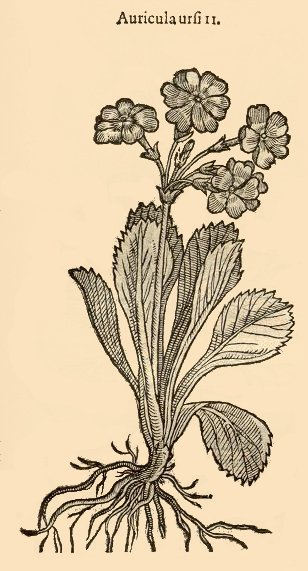 Illustration of Primula x pubescens Jacq. under the name Auricula ursi II